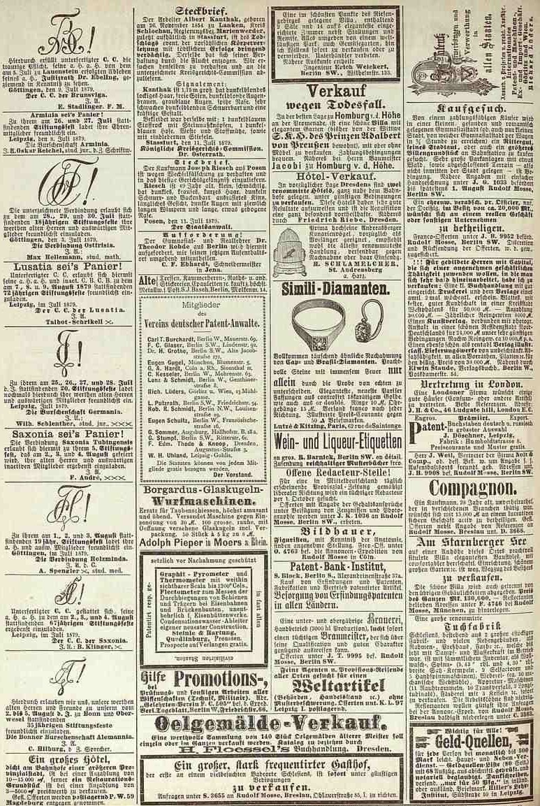 Seite aus der satirischen Zeitschrift Kladderadatsch, Jahrgang 1879.